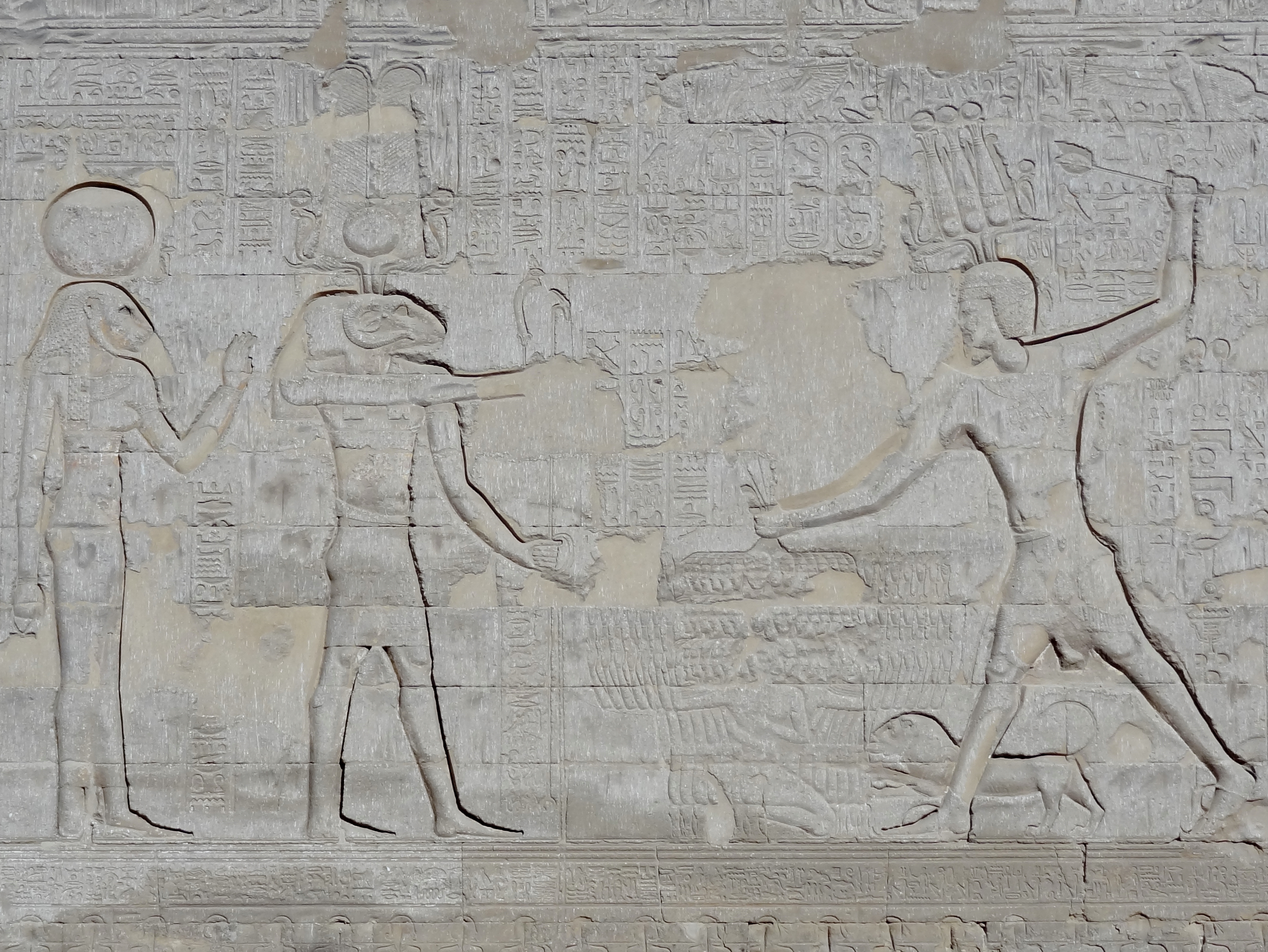 Kaiser Domitian erschlägt vor Chnum und Menhit die Feinde des Landes, Relief an der Südostseite des Pronaos des Tempels von Esna aus römischer Zeit, Ägypten